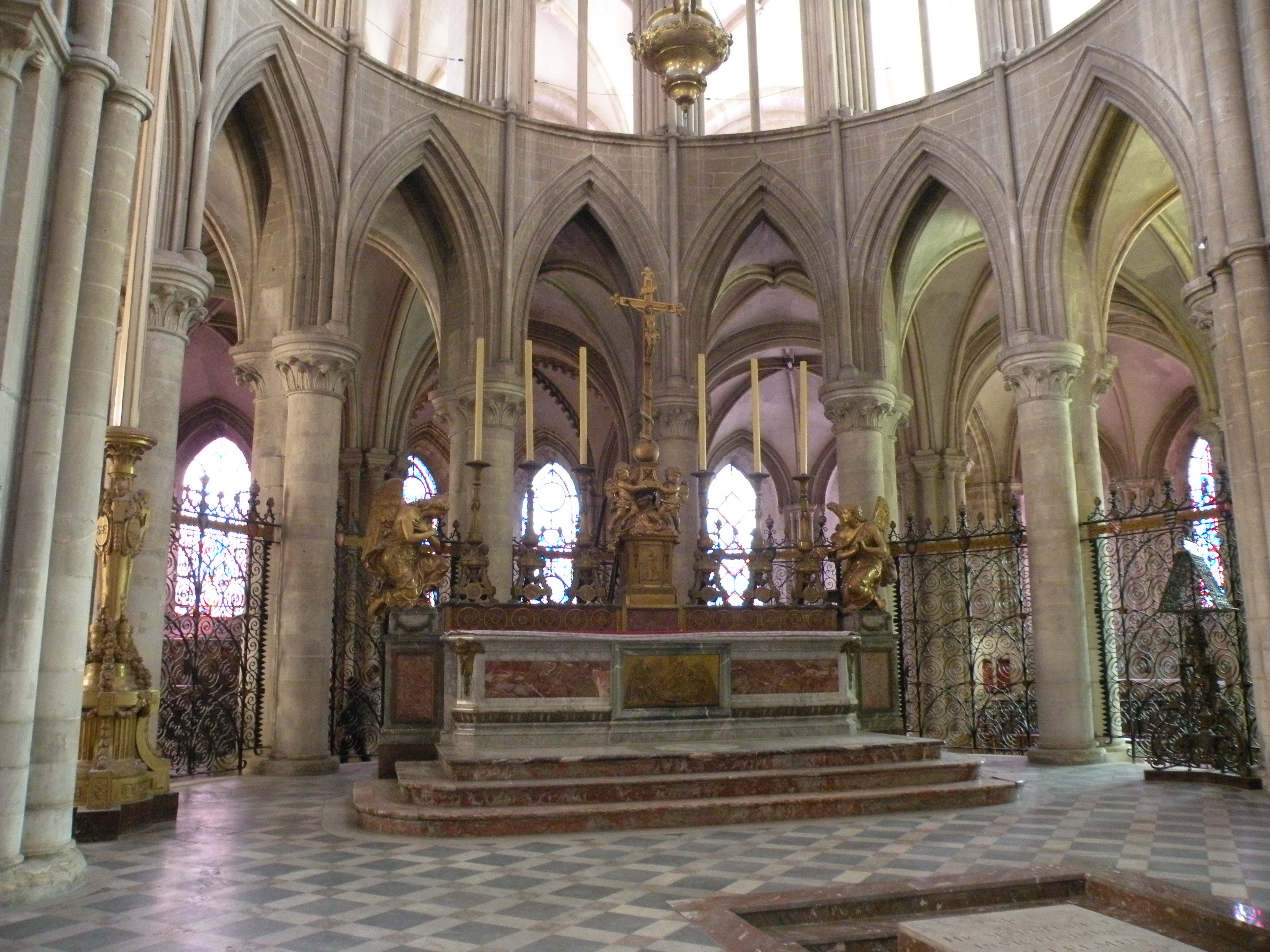 Interior of the church of Saint-Étienne, Caen